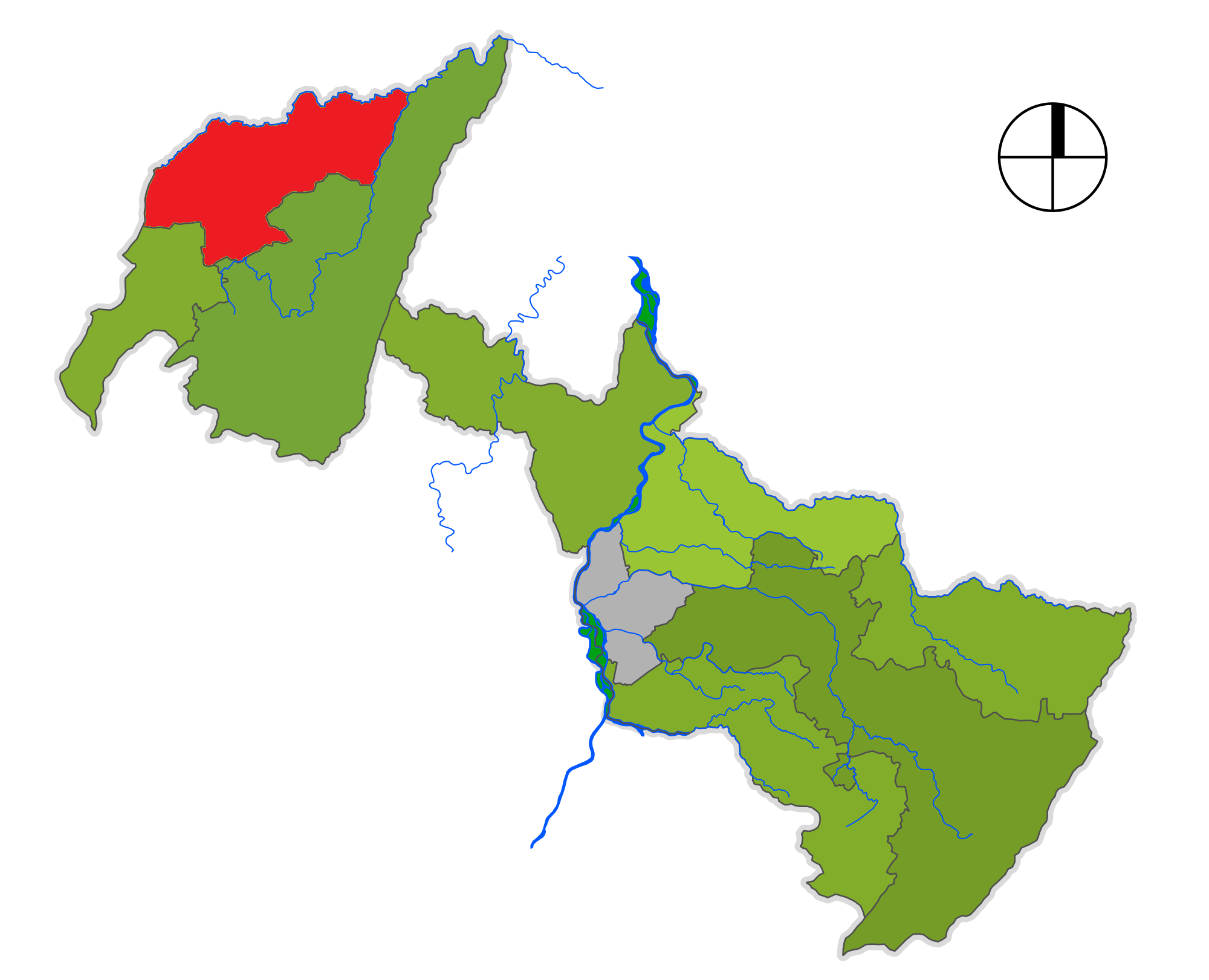 Corregimiento de Neiva Chapinero, departamento del Huila, Colombia.